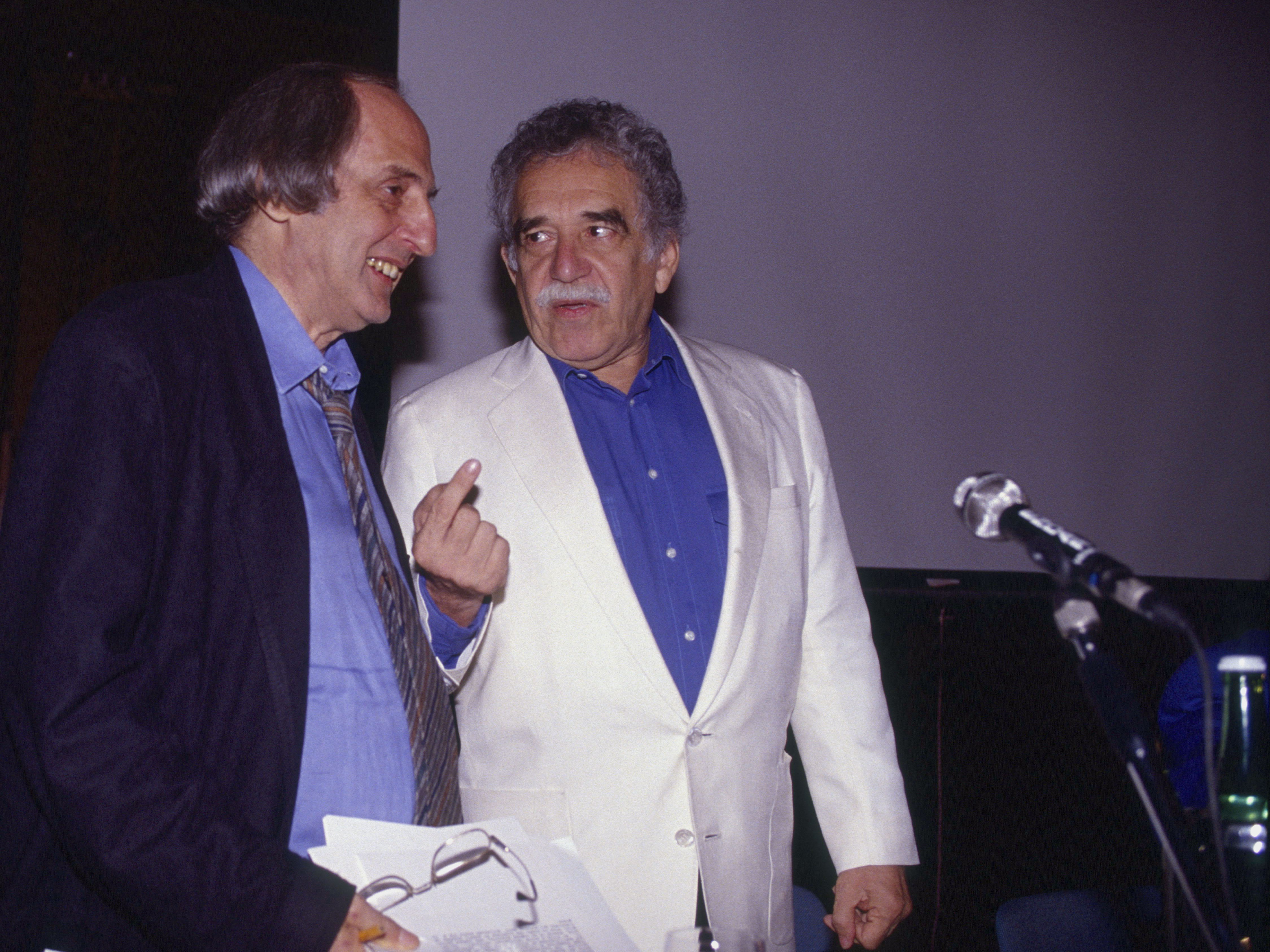 gabriel garcia marquez e francesco maselli